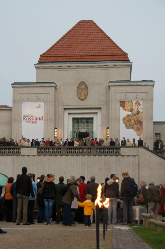 Ausstellungsgebäude Mathildenhöhe Russland 1900 Kunst und Kultur im Reich des letzten Zaren Vernissage: Samstag, 11. Oktober 2008, 18.30 Uhr